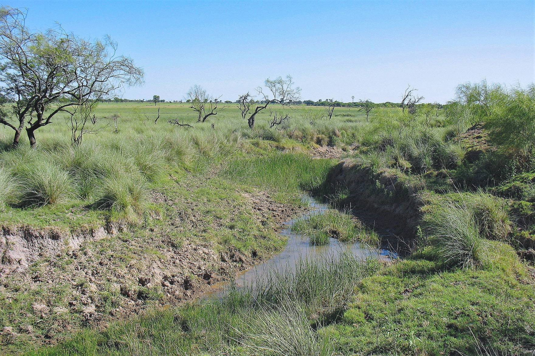 Descripción paisajística de la zona rural de Progreso (Santa Fe)